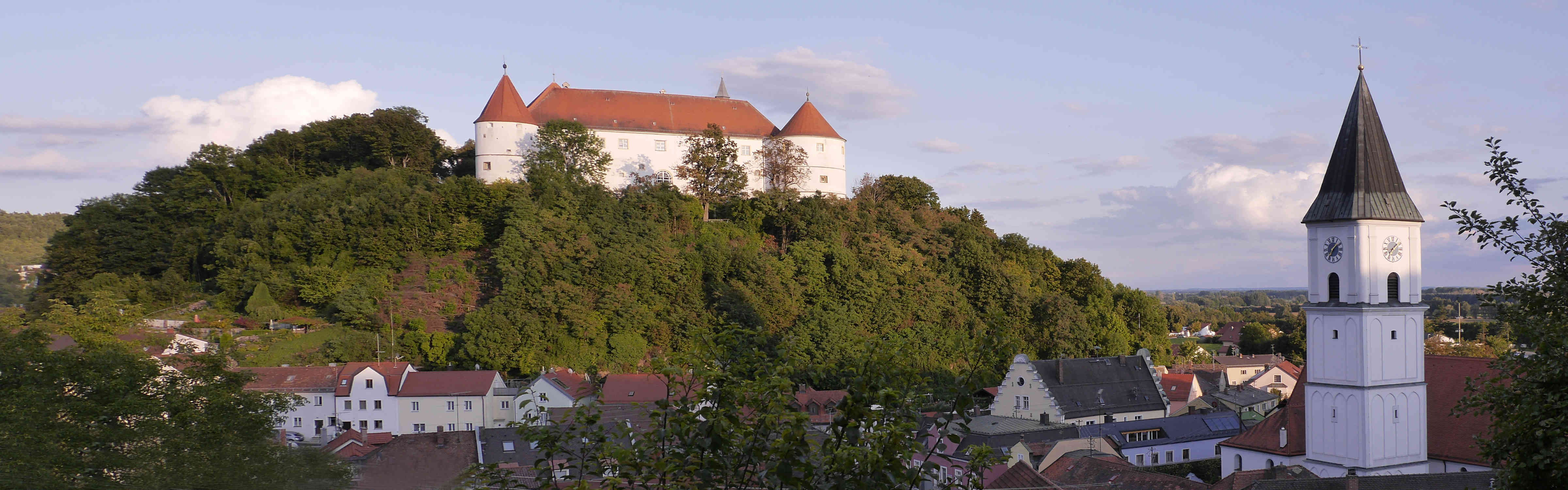 Wörth an der Donau Altstadt Panorama